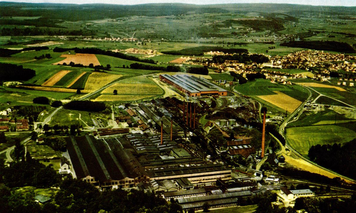 Ansicht des Eisenwerkes in Maxhütte